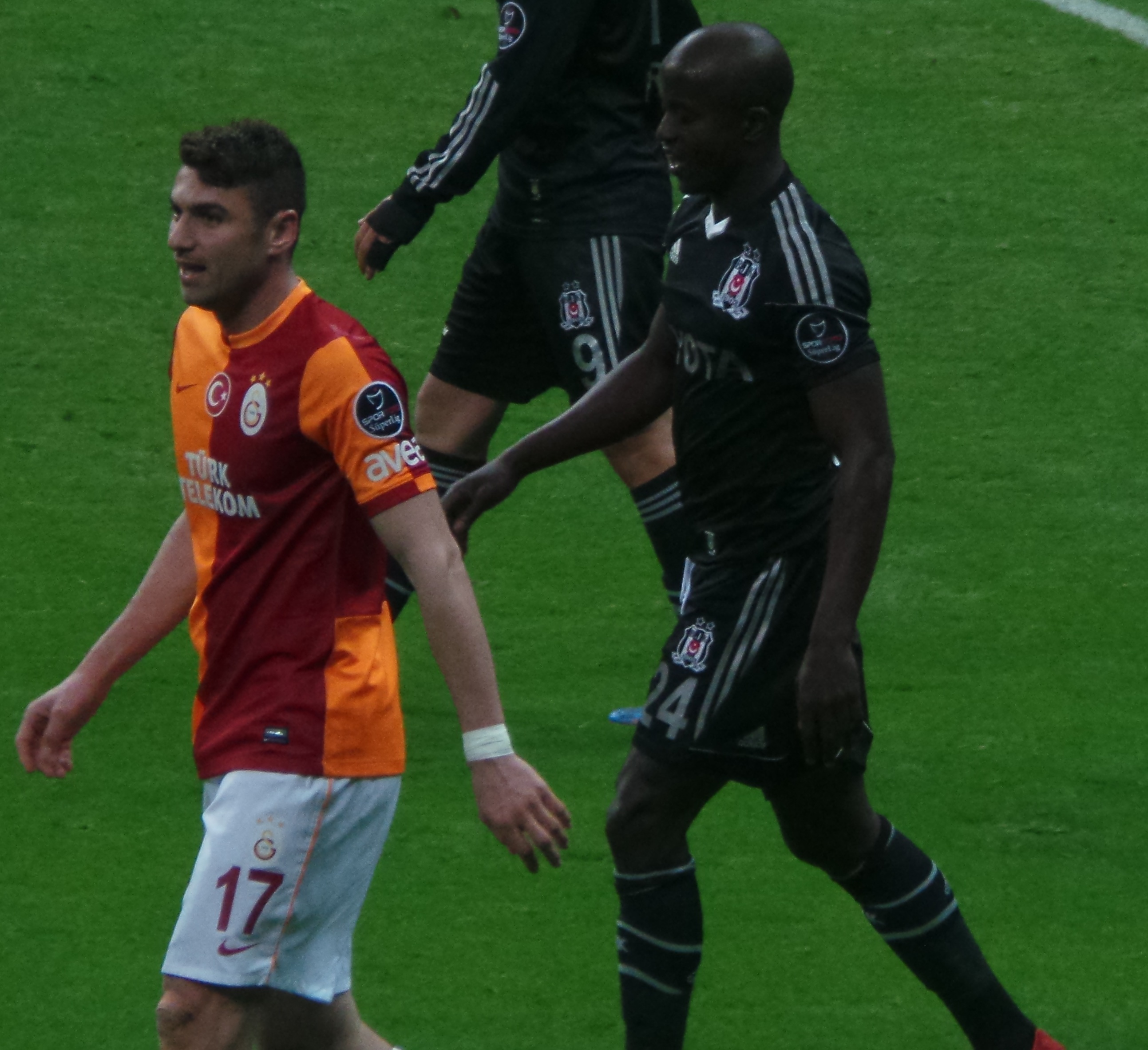 Dany Nounkeu ve Burak Yılmaz